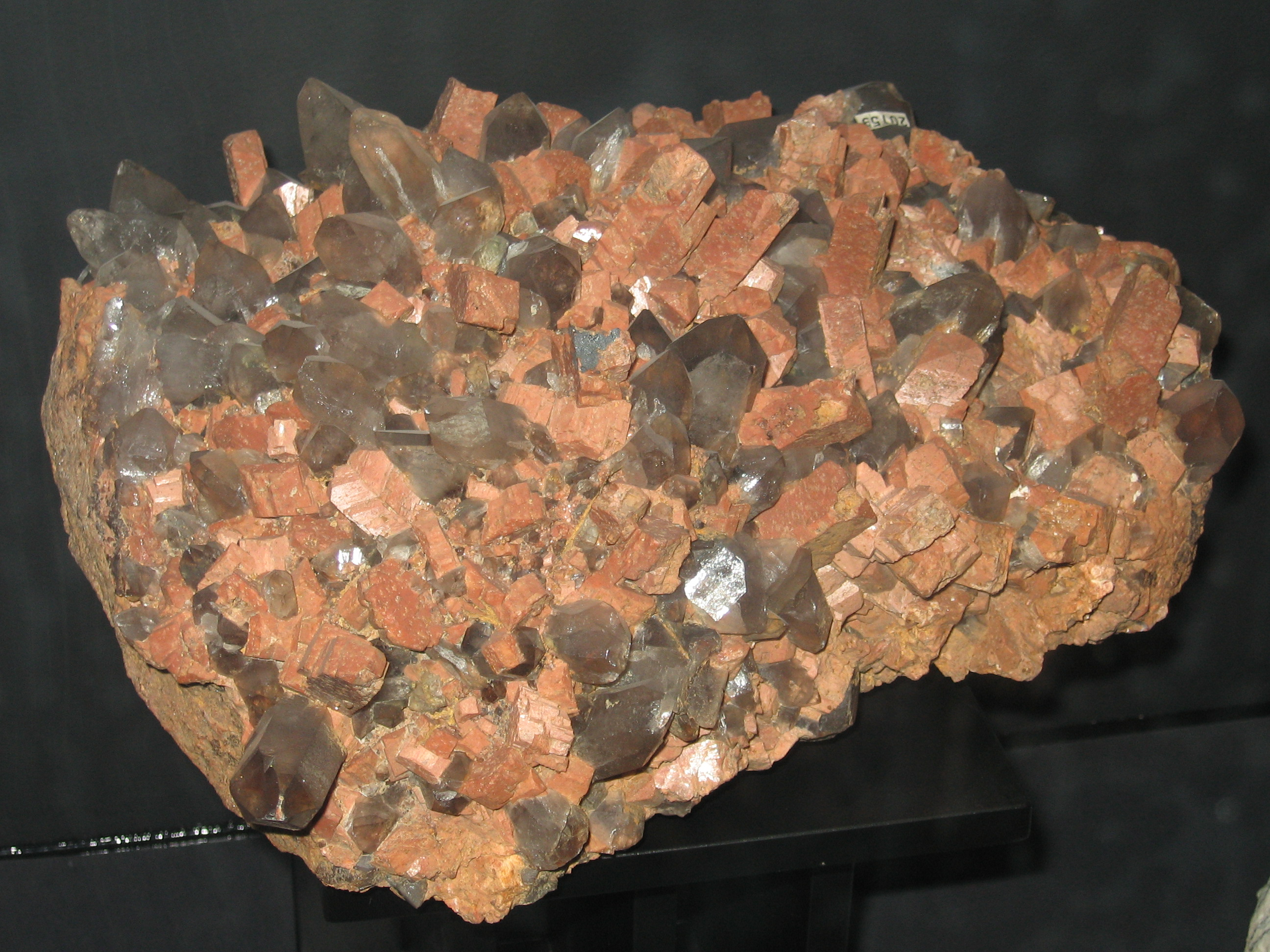 Fluorite-quarzo-ortoclasio from Cava Bianchi, Cuasso al Monte, Italy